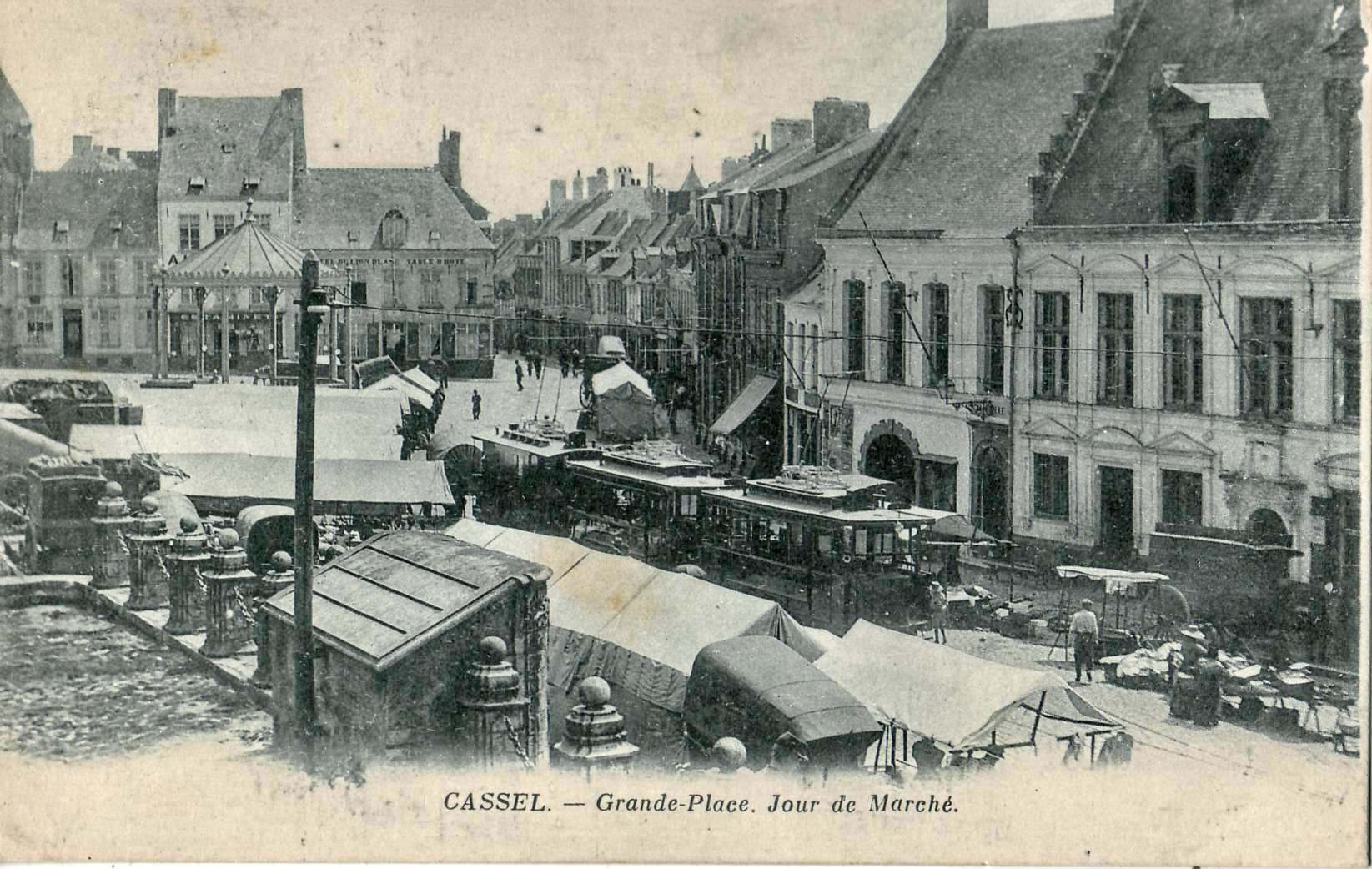 Carte postale ancienne éditée par ND :CASSEL - Grande-Place. Jour de Marché